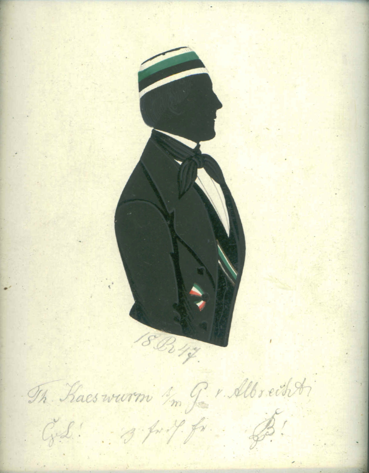 Silhouette von Theodor Kaeswurm, Rittergutsbesitzer auf Puspern, Ostpreußen; Angehöriger der Corps Litthuania und Saxo-Borussia